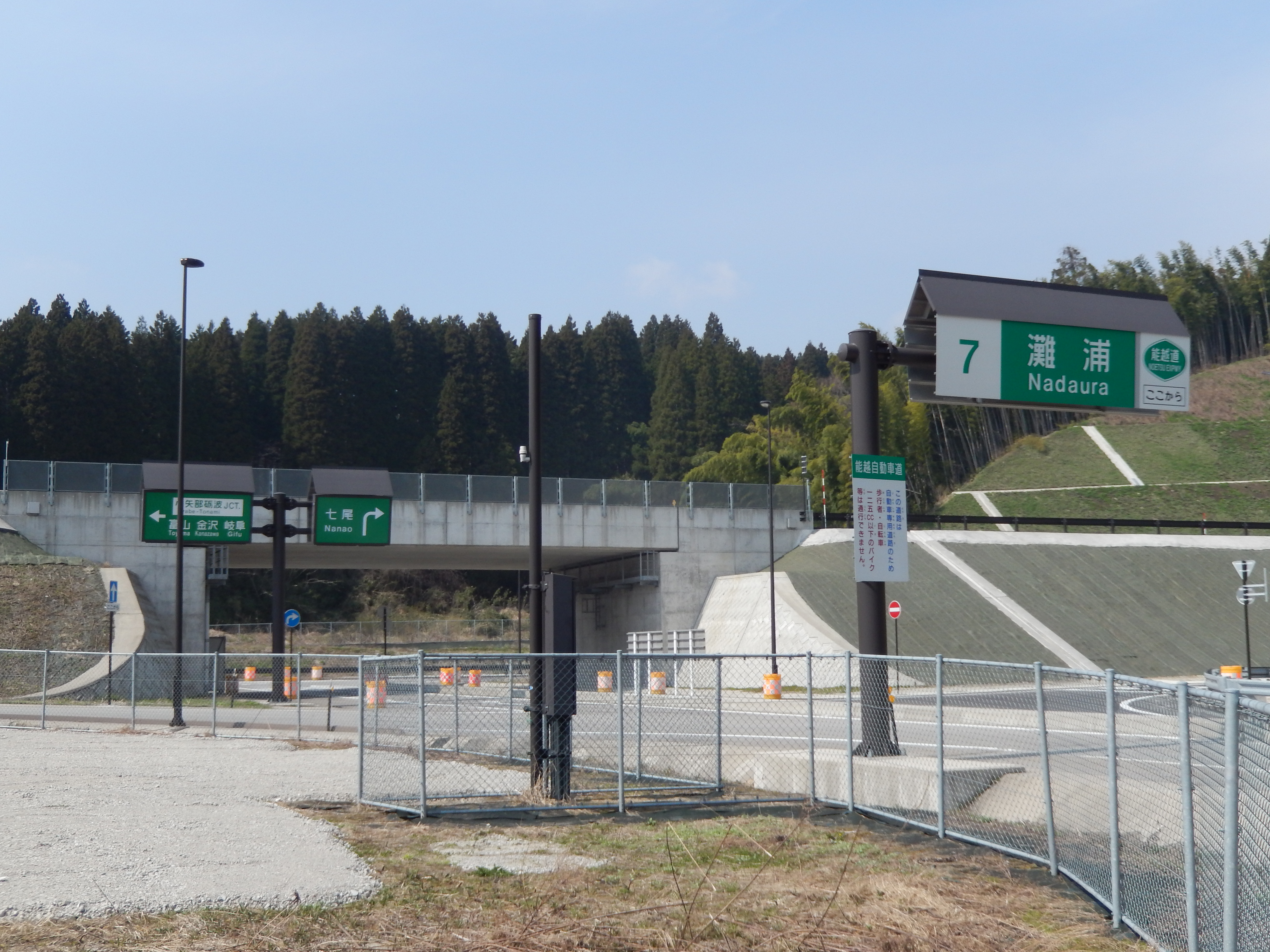 灘浦インターチェンジ入口